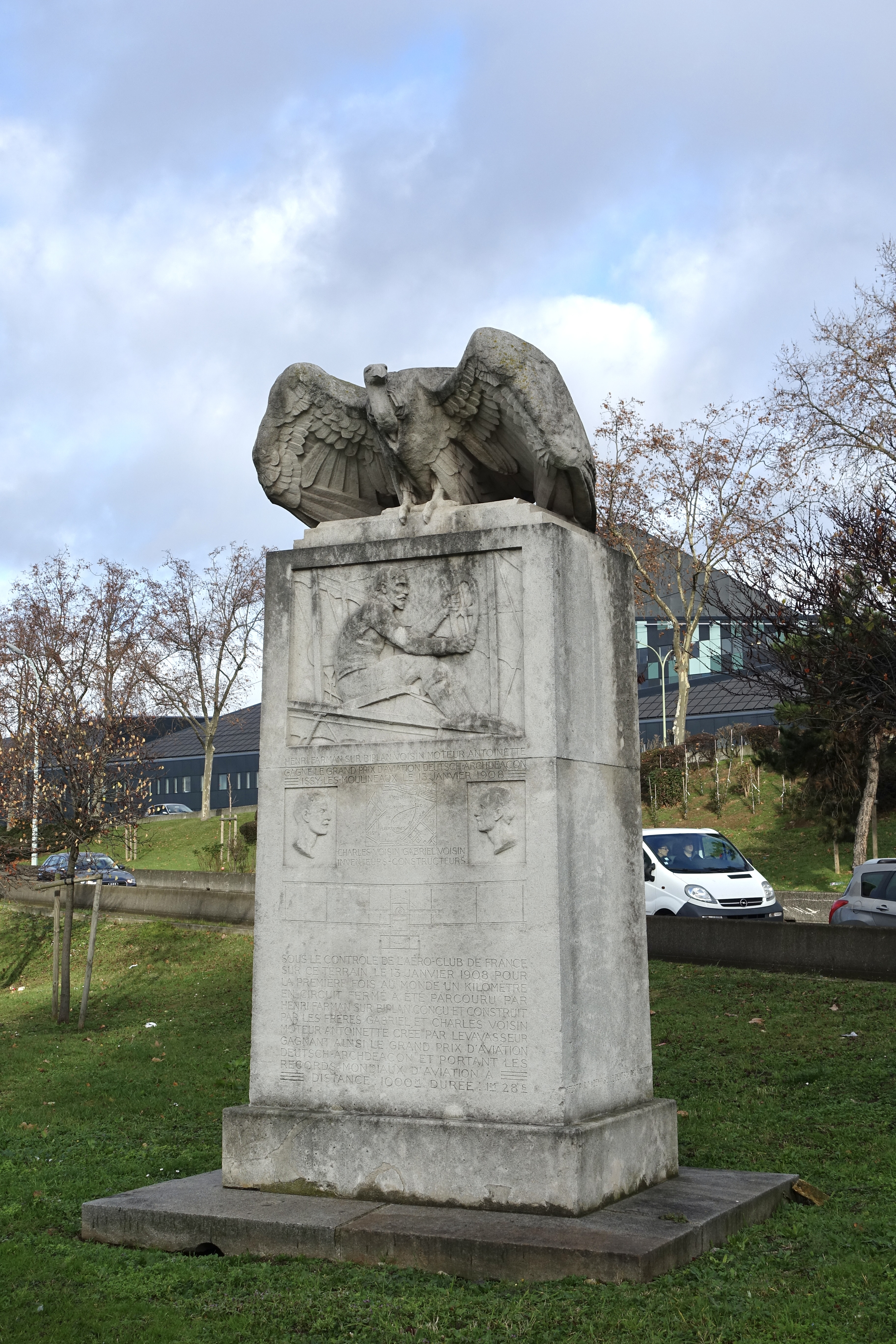 Monument Farman - Voisin, 1929, ronde-bosse et bas-reliefs, pierre, rue Louis-Armand à l'intersection avec la rue Henri Farman, 15e arrondissement, Paris, France.Stèle posée sur un socle bas surmontée d'un vautour en ronde bosse, en position frontale et debout, déployant les ailes, tête légèrement tournée vers son aile gauche. Inscriptions en lettres majuscules comme suit:inscription sur le socle, côté gauche en bas : Offert par Mademoiselle Deutsch de la Meurthe (Suzanne Deutsch de la Meurthe).Inscriptions sur le devant de la stèle, au registre supérieur: Henri Farman sur biplan Voisin moteur Antoinette / gagne le Grand Prix d’aviation / Deutsch-Archdeacon / Issy-les-Moulineaux le 13 janvier 1908 et représentation en relief de Farman assis à son poste de pilotage; en dessous: Charles Voisin, Gabriel Voisin / inventeurs - constructeurs avec portraits de tête en relief des frères Voisin de part et d'autre d'un plan du Champ de manœuvres d'Issy-les-Moulineaux; en dessous: biplan stylisé; au registre inférieur: Sous le contrôle de l’Aéro-Club de France / sur ce terrain, le 13 janvier 1908 pour / la première fois au monde un kilomètre / en circuit fermé à été parcouru par / Henri Farman sur Biplan conçu et construit / par les frères Gabriel et Charles Voisin / moteur Antoinette crée par Levavasseur / gagnant ainsi le Grand Prix d’Aviation / Deutsch – Archdeacon et portant les / records mondiaux d’Aviation à / distance : 1000 m. Durée : 1m 28s.